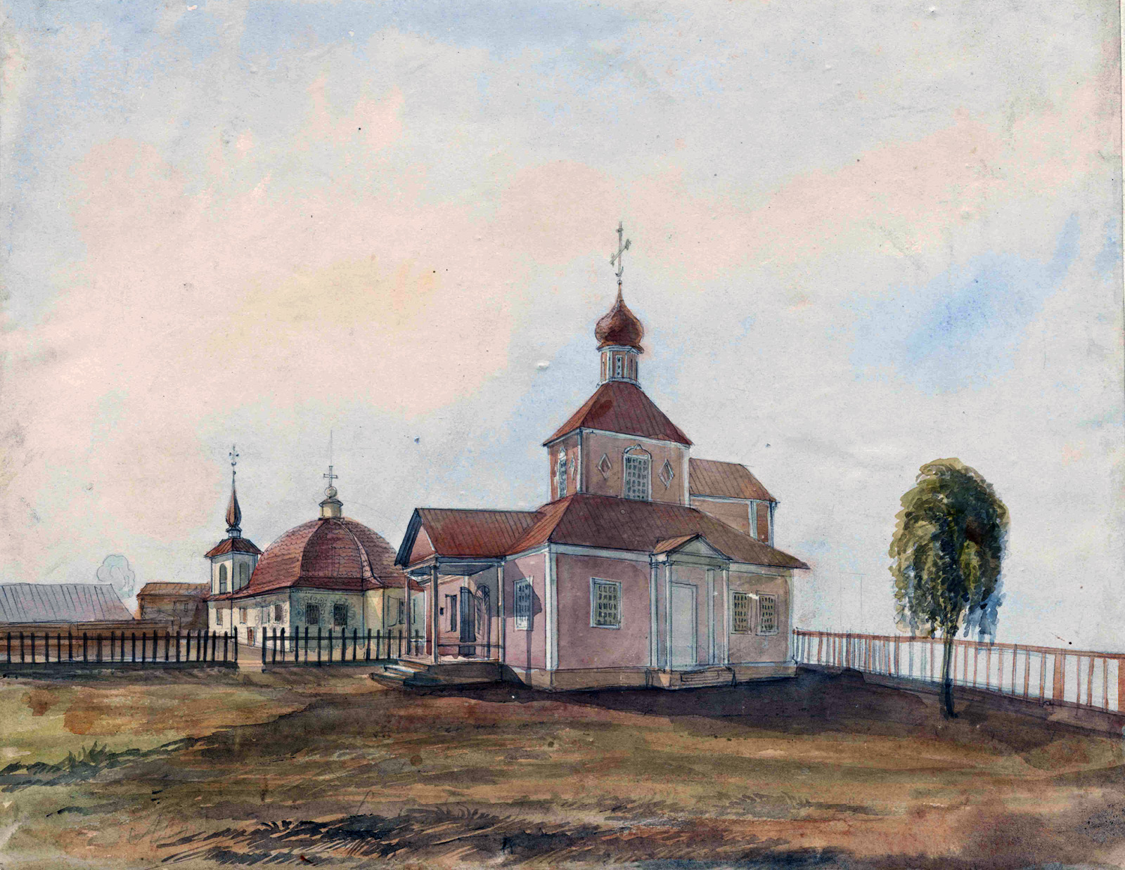 Беларуская (тарашкевіца): Магілёў (Mahiloŭ), вуліца Глебабарысаўская (vulica Hlebabarysaŭskaja). Старая царква Сьвятых Барыса і Глеба